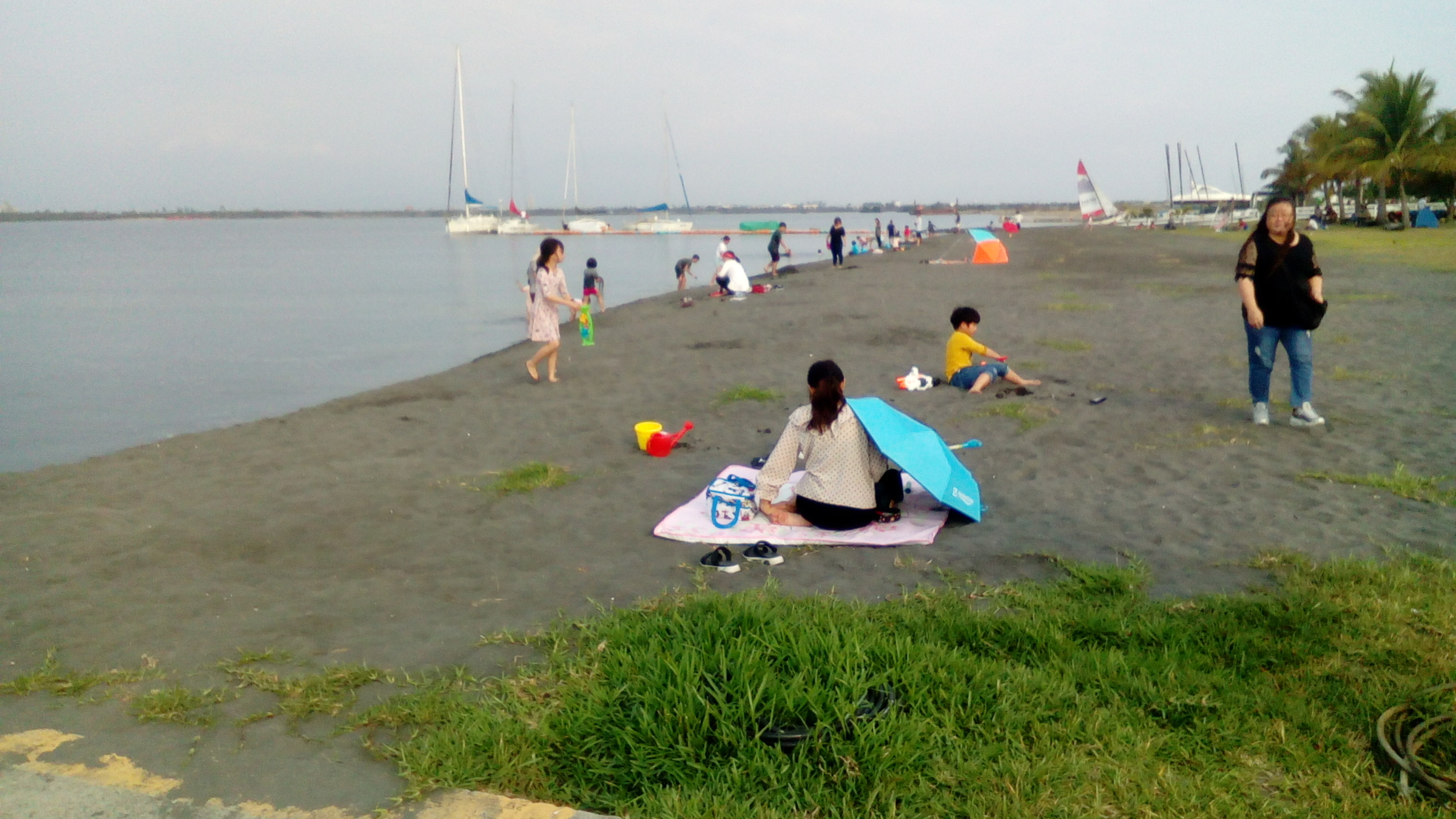 位於大鵬灣南畔的濱灣公園內 為灣內少數可供戲水的沙灘